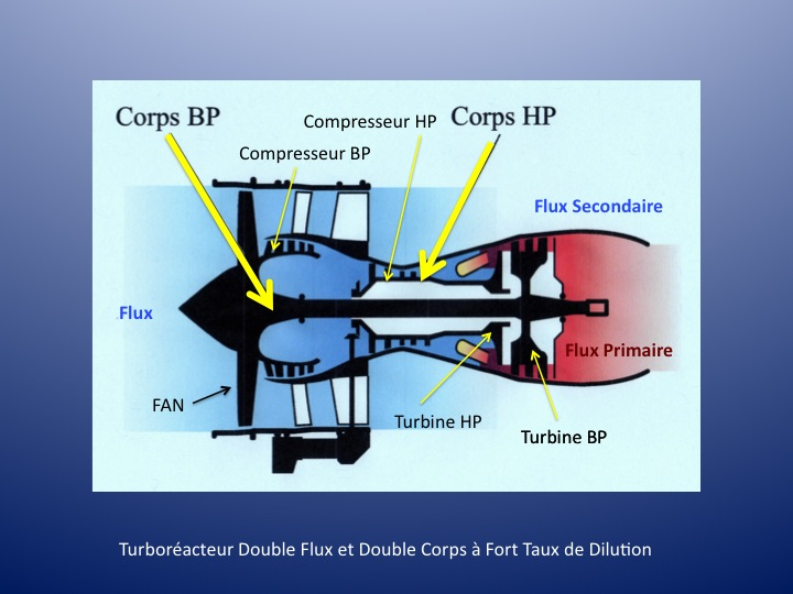 Turboréacteur Double Corps Double Flux à Fort Taux de Dilution